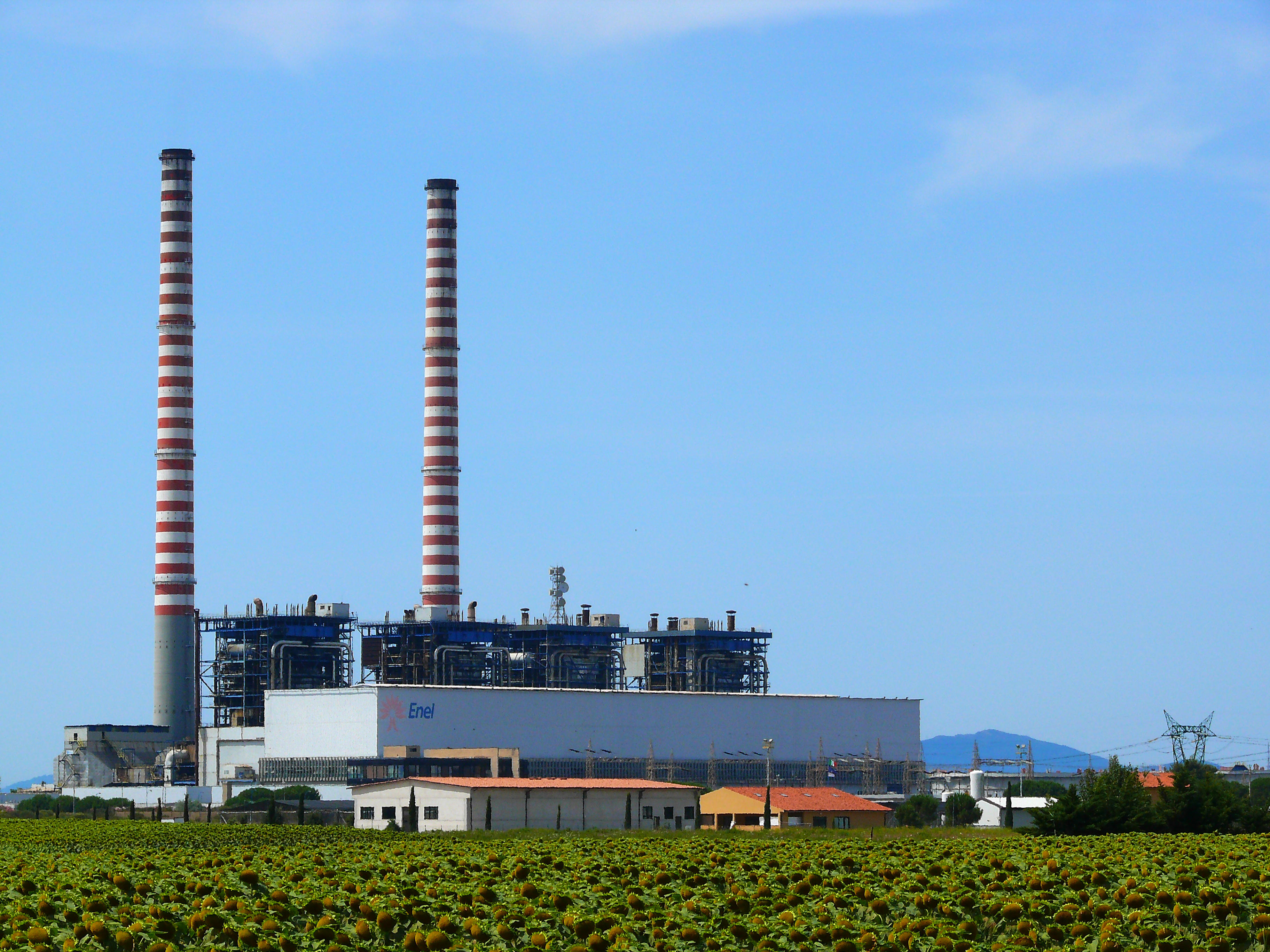 ENEL-Industrieanlage bei Piombino